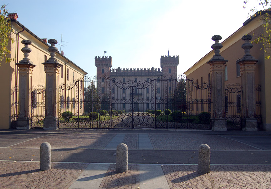 Castello di Cislago